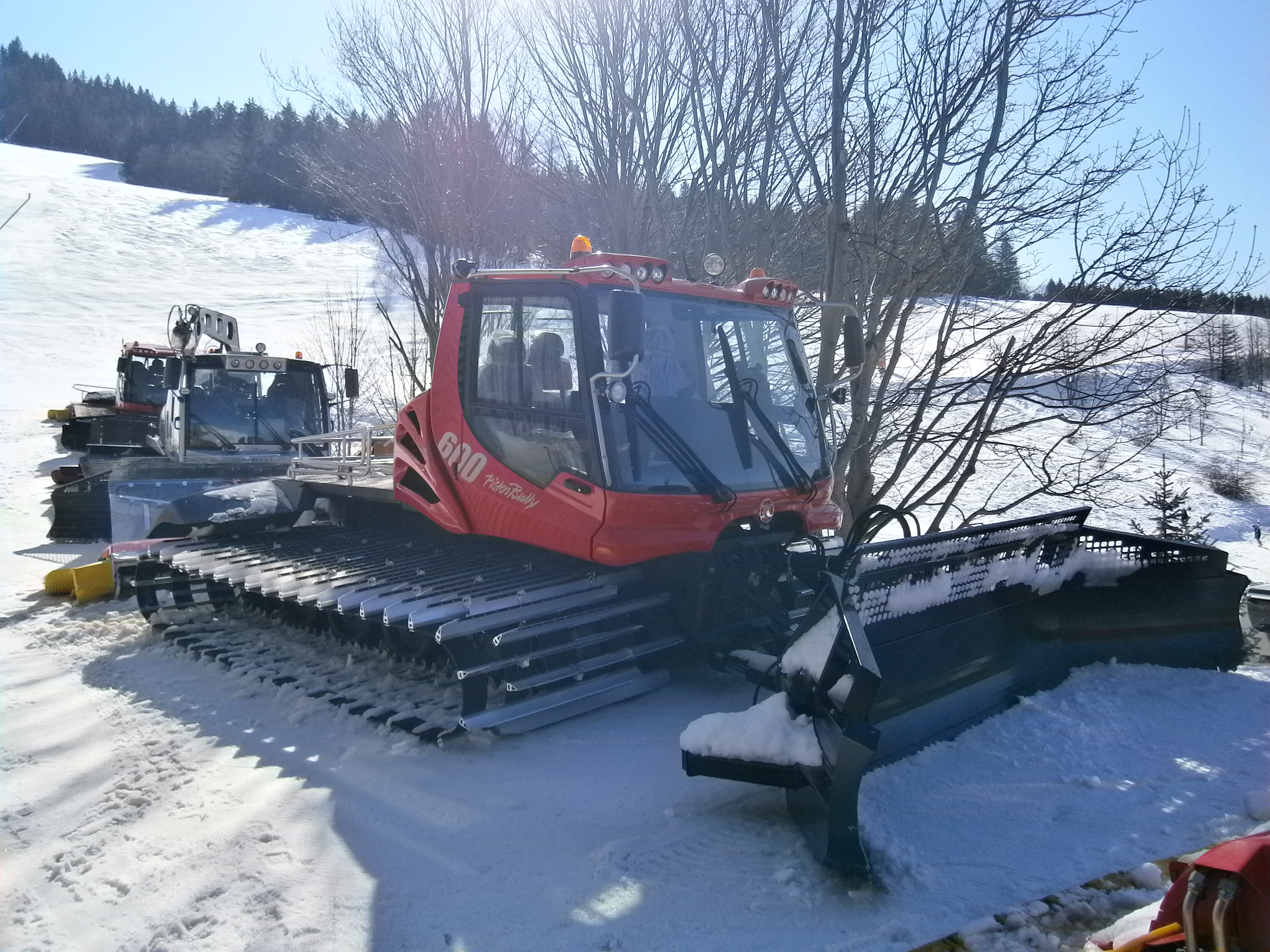 Espace Villard-Corrençon (38) : Une dameuse Pisten Bully 600, stationnées au Balcon de Villard.